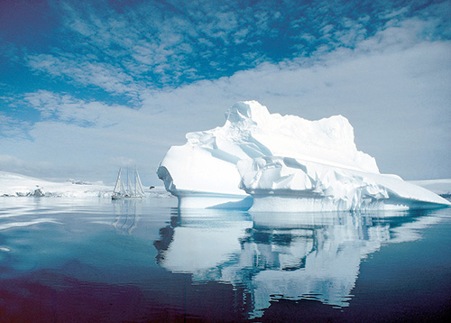 La Goleta Idus de Marzo navega en su expedición antártica sorteando témpanos de hielo.